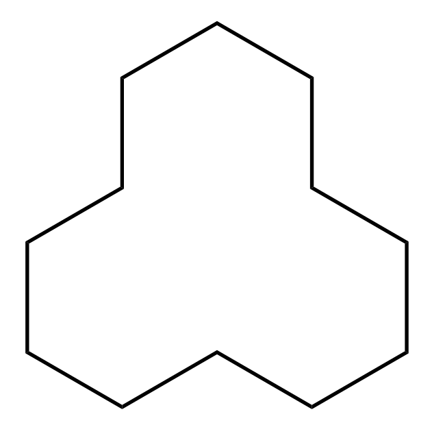 Cyclododecaan